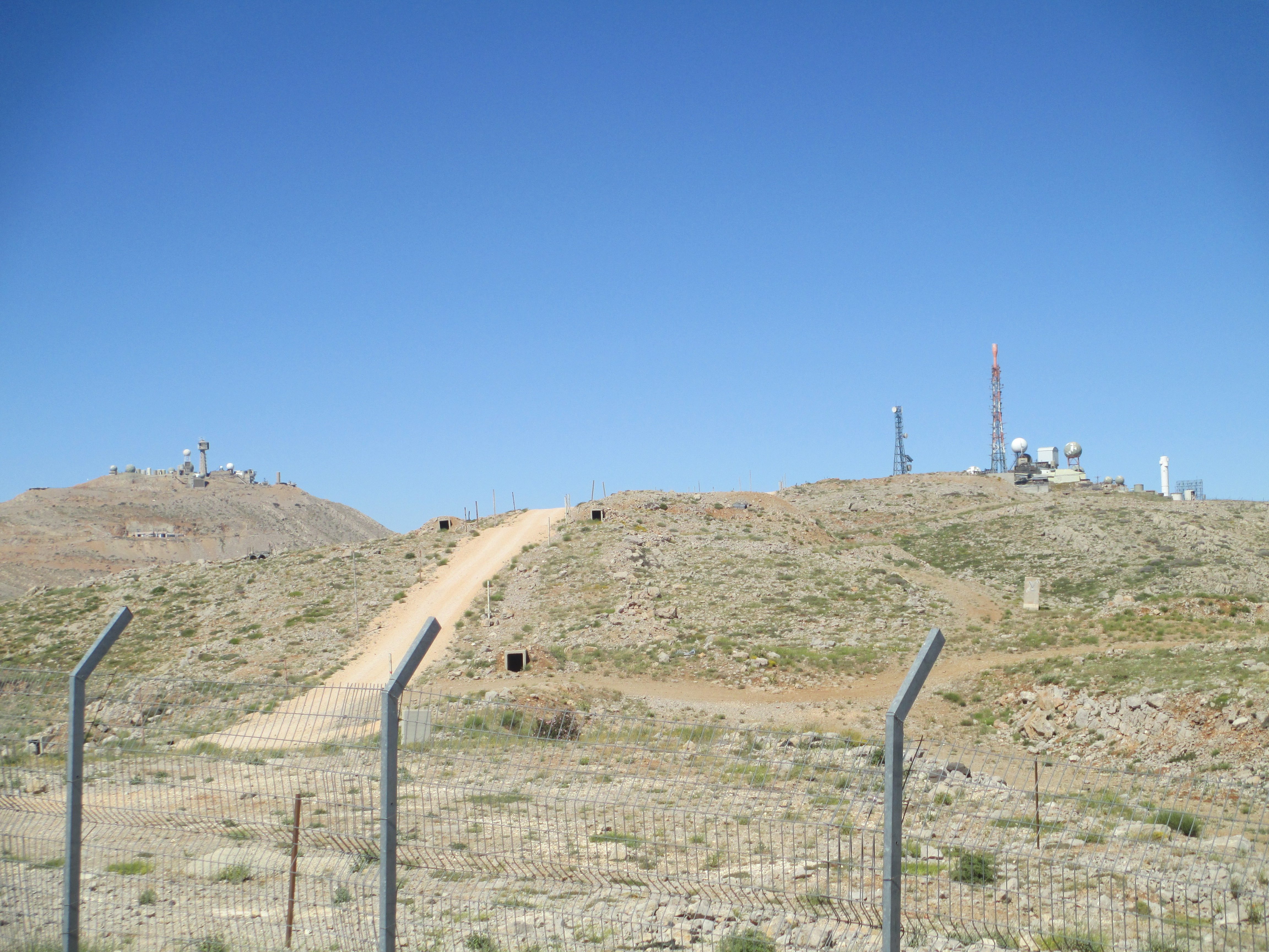 מצפה חורן (מוצב החרמון)-מימין ומצפה שלגים (משמאל) בכתף החרמון